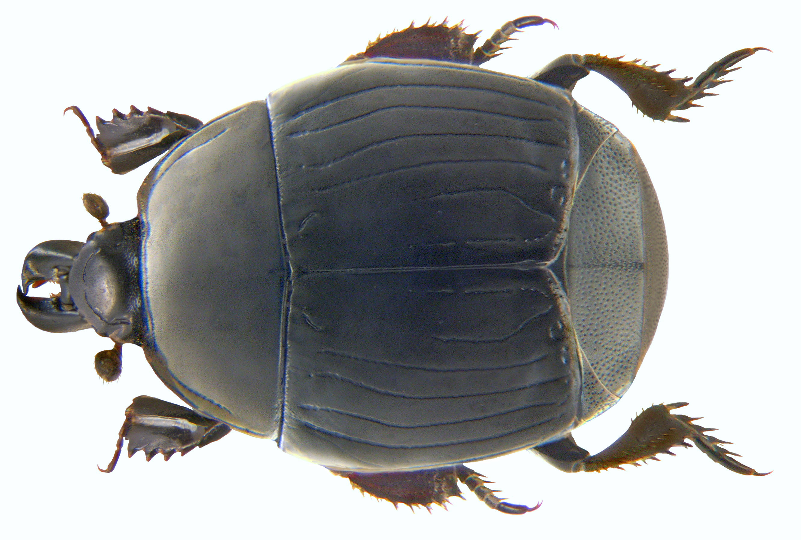 Familie: Histeridae Grösse: 6-8,5 mm Verbreitung: Europa Ökologie: besonders in alten Vogelnestern in hohlen Bäumen, im Dung, in faulenden Vegetabilien Fundort: Korsika, Ghisonaccia leg.det. U.Schmidt, 1973 Foto: U.Schmidt, 2009